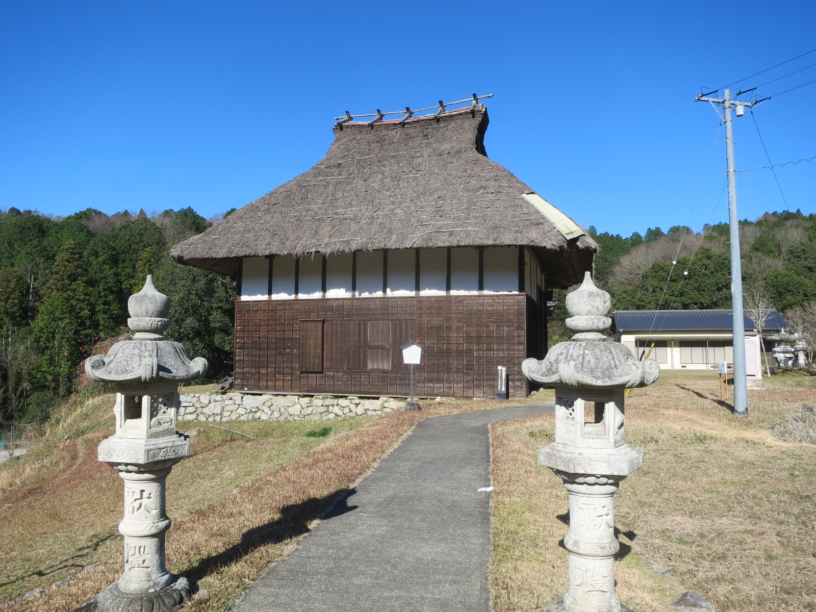 大川神明宮の舞台（愛知県指定有形民俗文化財）